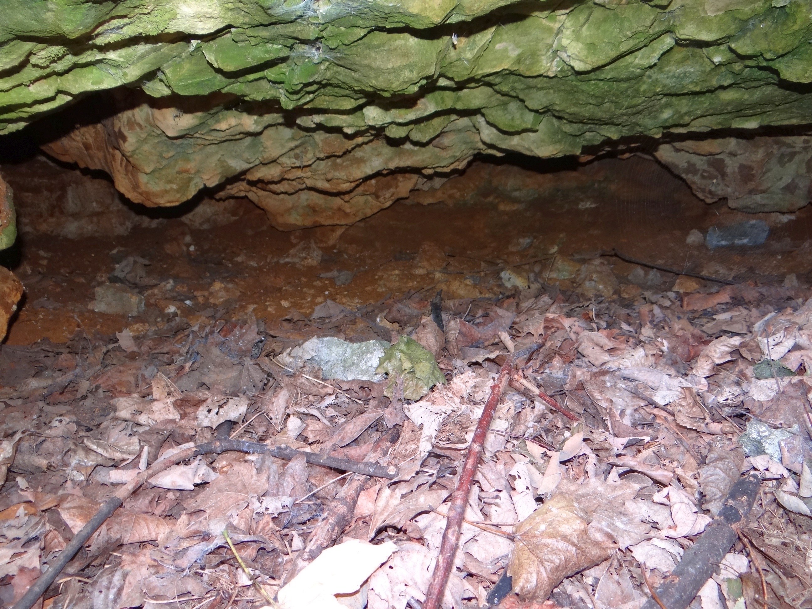 Jaskinia Wywiew na Zakrzówku w Krakowie